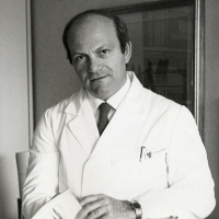 Foto di Vincenzo Gallucci